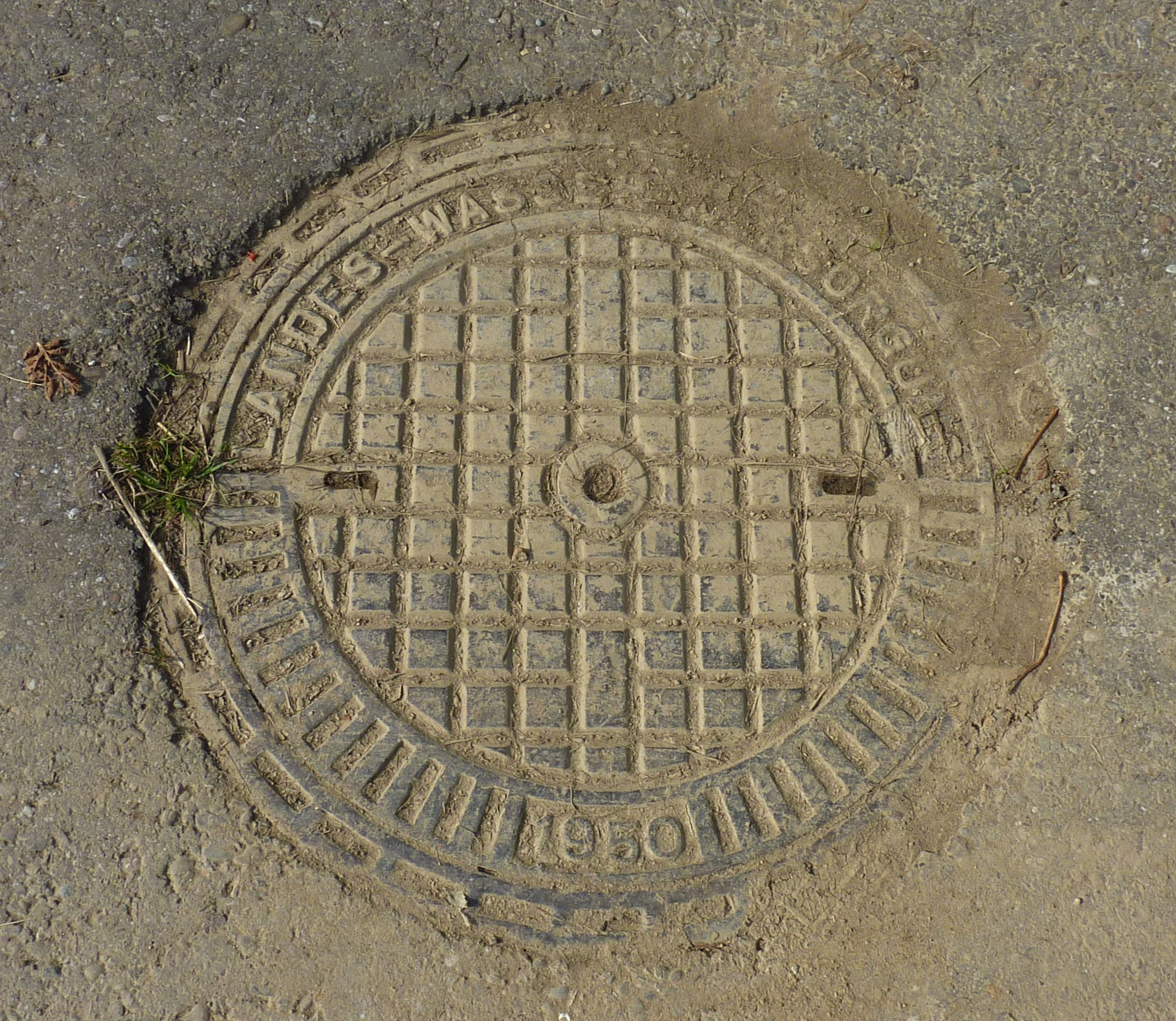 Schachtdeckel beim Reinhold-Maier-Turm, 2014, selbst fotografiert